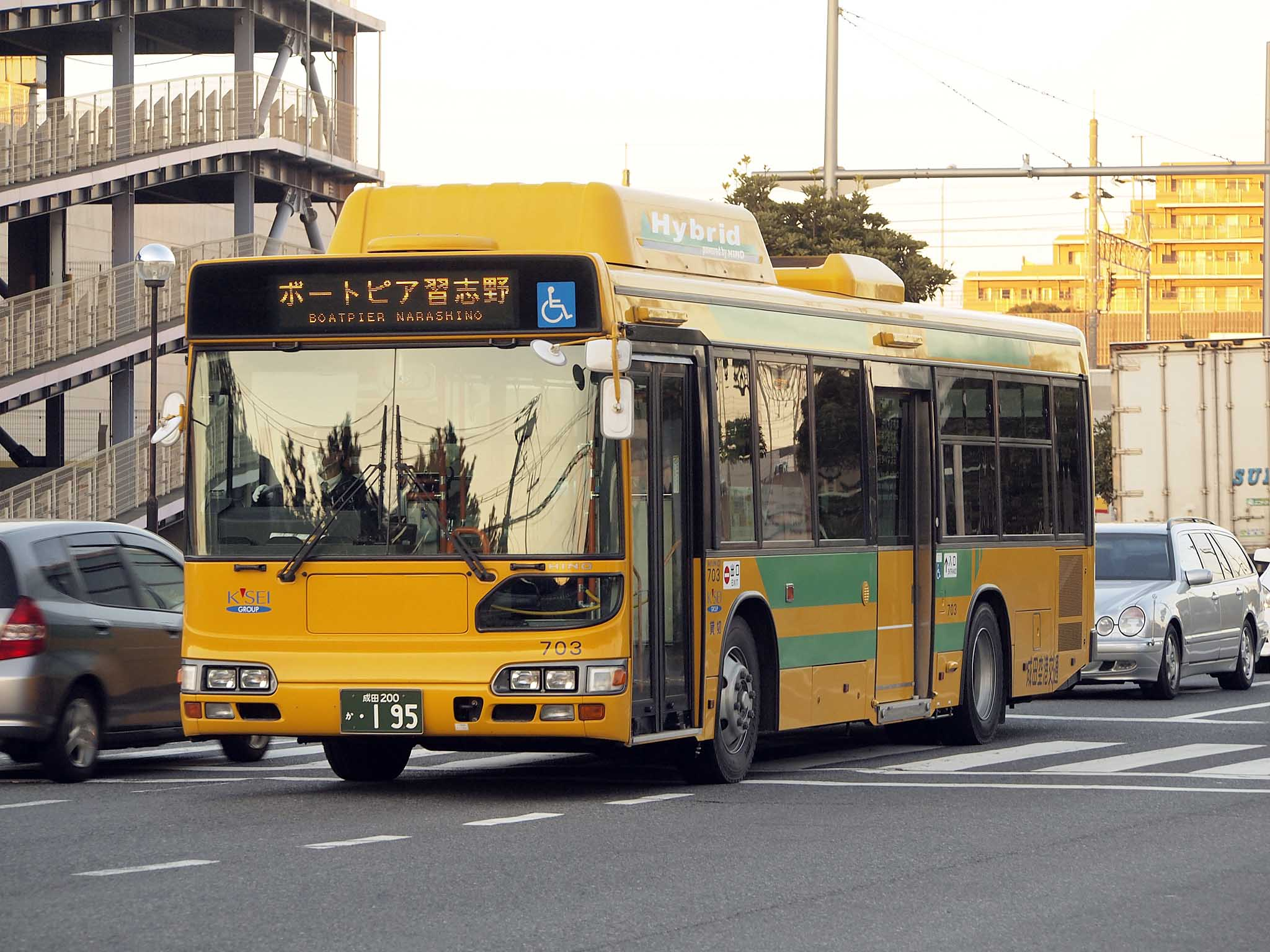 成田空港交通の日野・ブルーリボンシティハイブリッド。702と703は成田空港ターミナル循環バス時代の塗装で場外舟券売り場「ボートピア習志野」と津田沼駅を結ぶシャトルバスに転用されている。 型式：BJG-HU8JMFP 登録番号：成田200か・195 撮影地：千葉県習志野市、新習志野駅付近